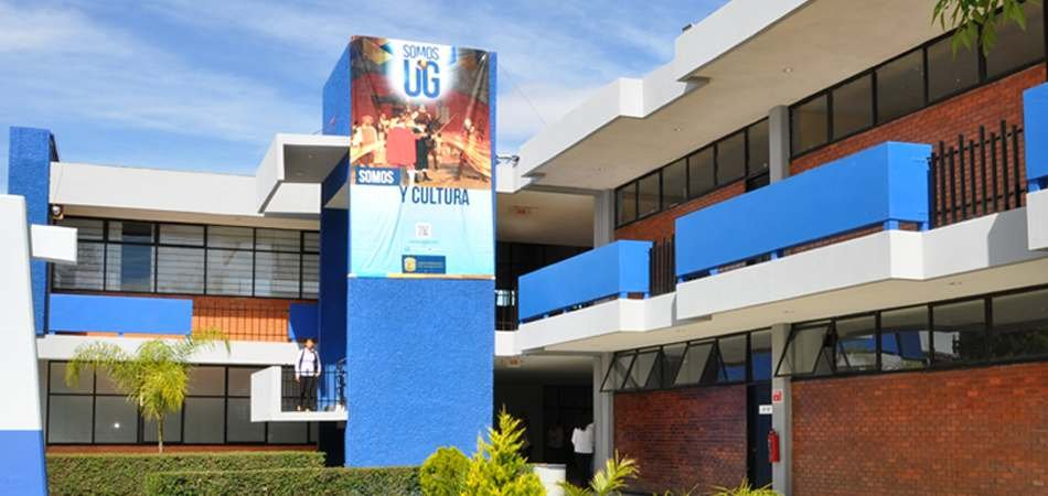 Escuela del Nivel Medio Superior de Moroleón